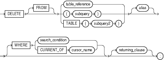 Монгол: Зураг1:Статементийн ажиллах зарчим